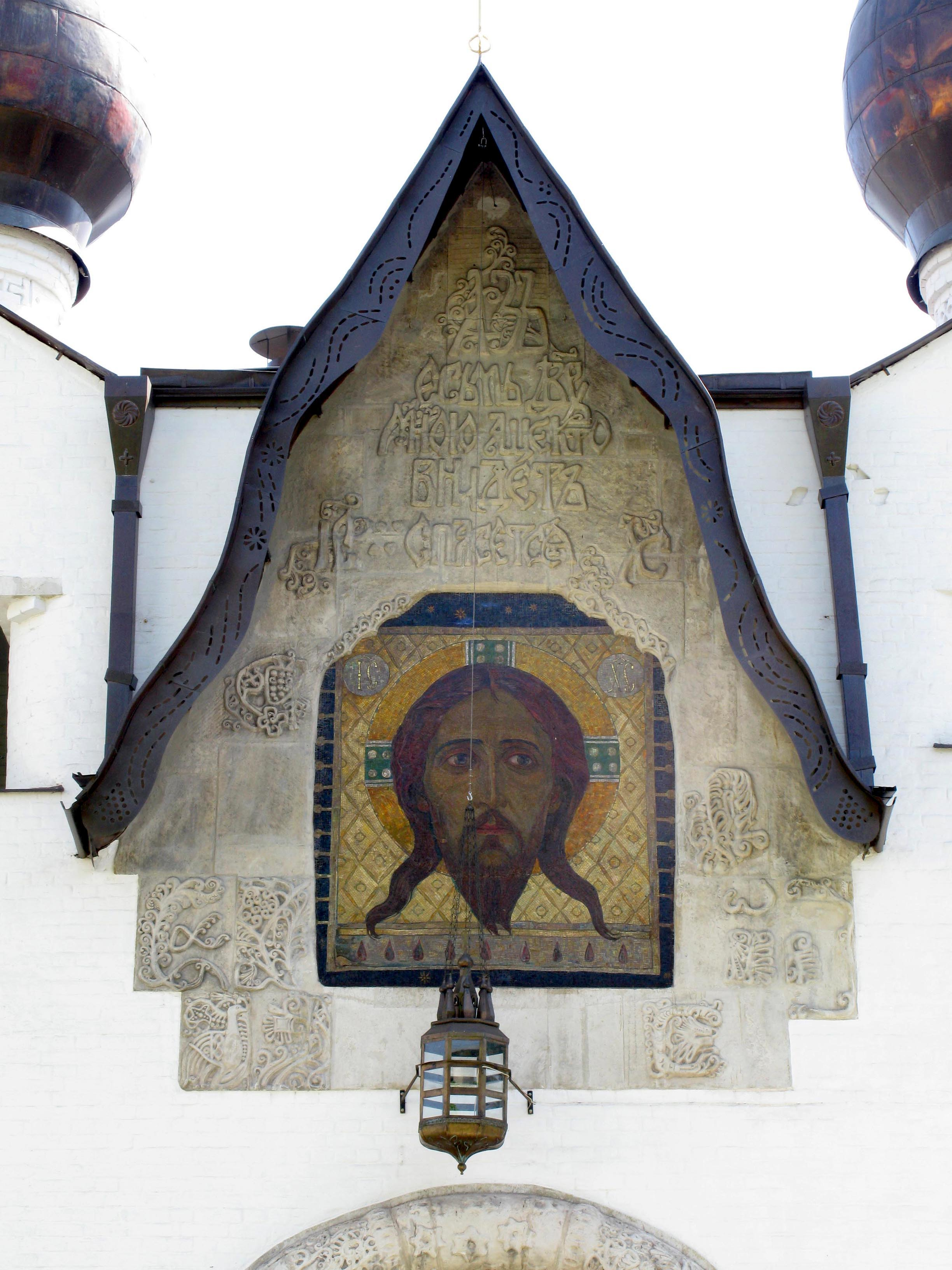 Храм Покрова Пресвятой Богородицы Марфо-Мариинской обители